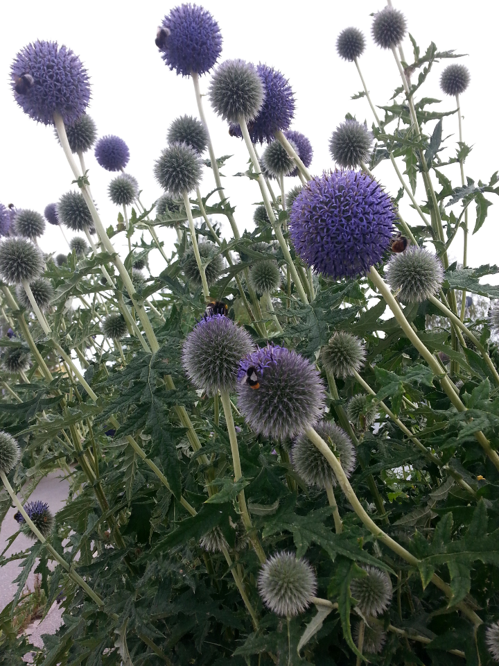 Blå bolltistel (Echinops bannaticus) i Upplands Väsby